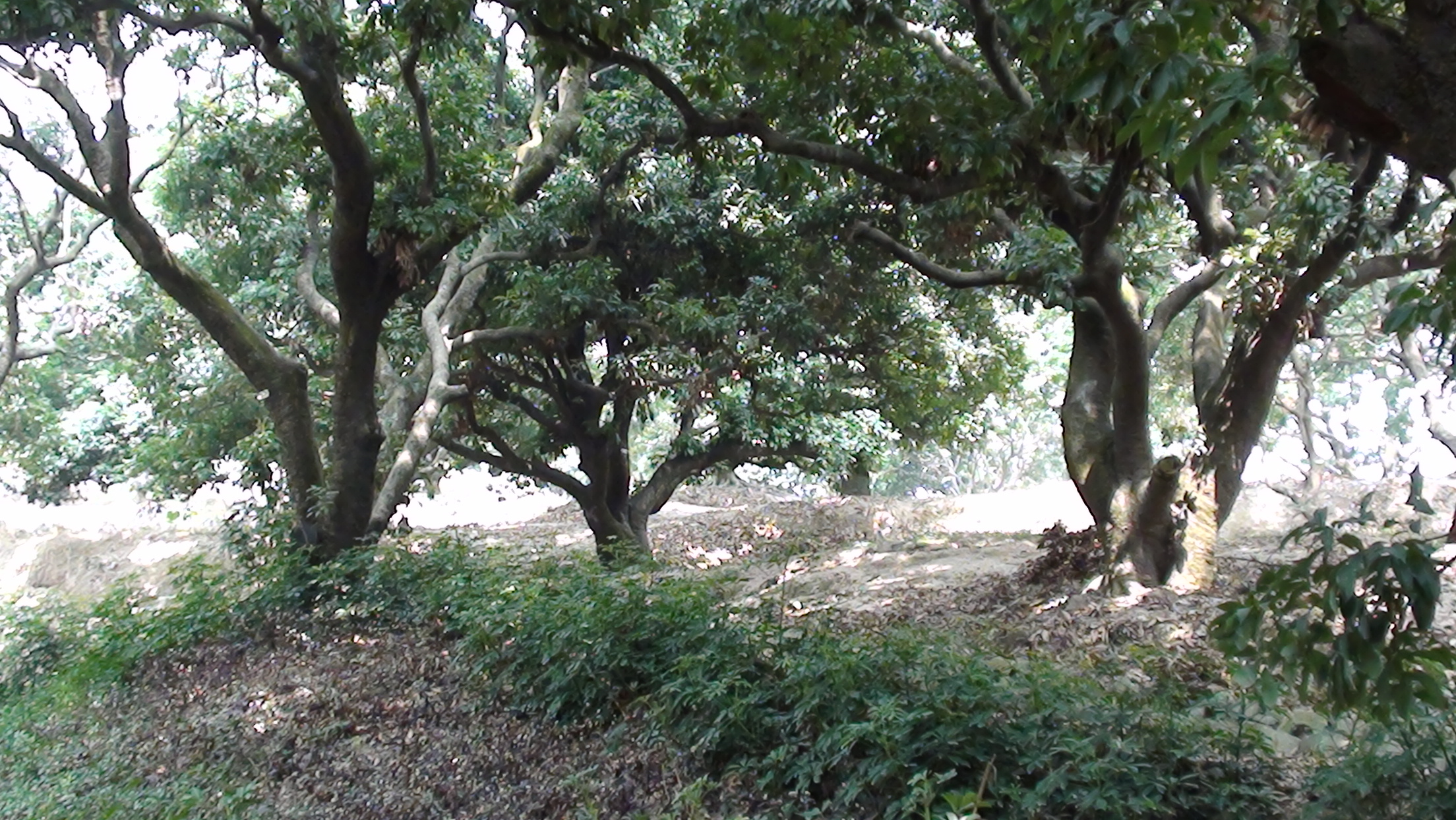 中国深圳大南山古荔枝树